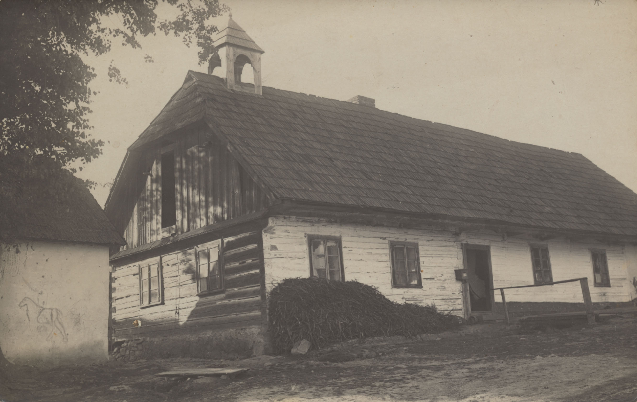 škola v Nepomuku (okres Příbram)